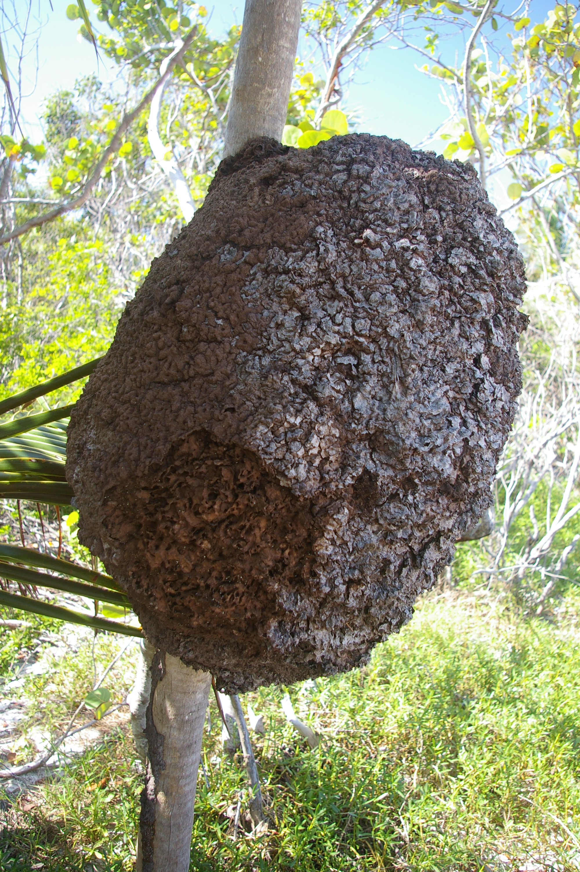 An arboreal termite nest from Tulum, Mexico